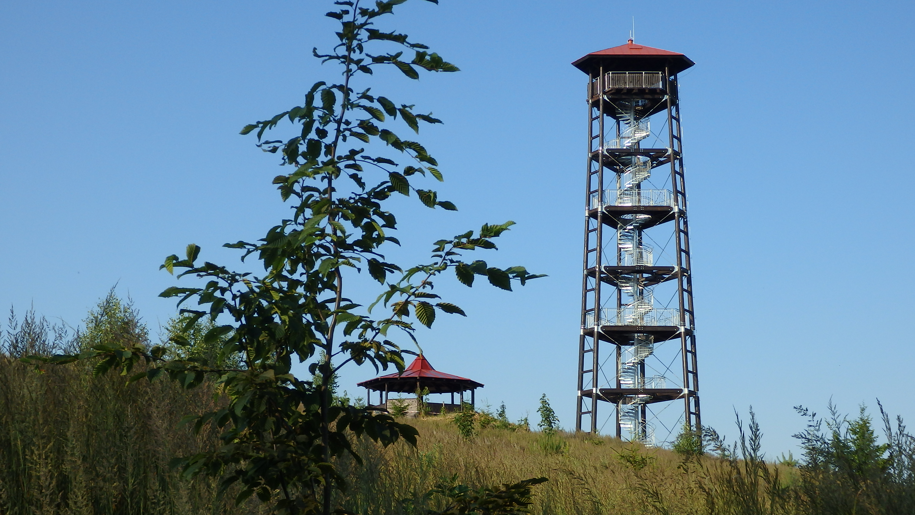 rohledna Babka, návrší Mezi cestami, 2 km severně Zruče nad Sázavou, okres Kutná Hora